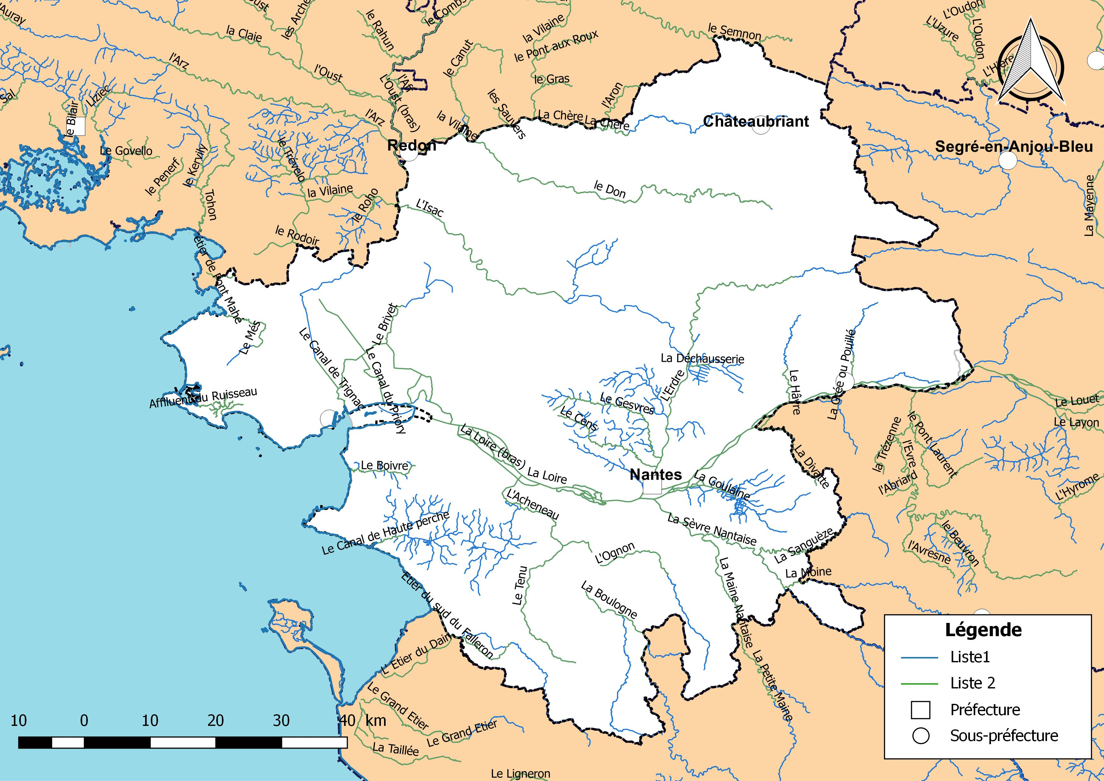 Classement des cours d'eau du département de la Loire-Atlantique (France) au titre de la continuité écologique (article L214.17 I du Code de l'environnement).